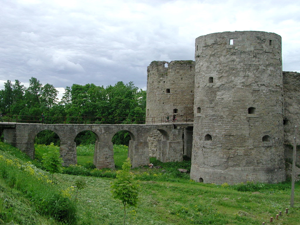 Крепость Копорье (Лен.область, село Копорье)